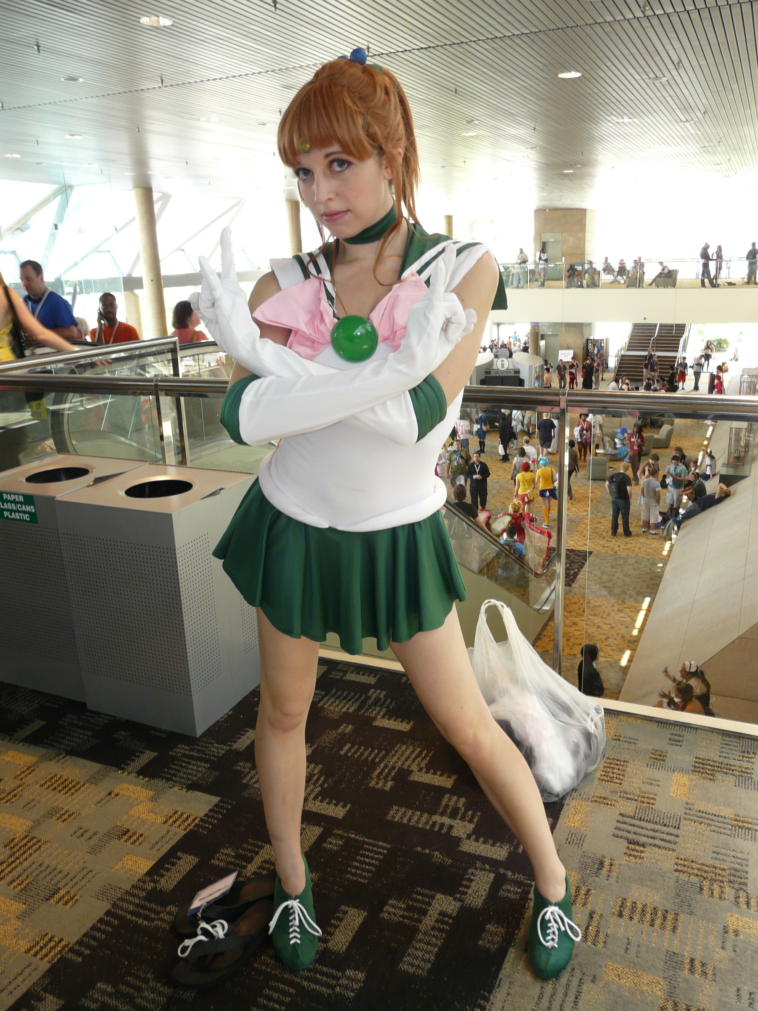 Otakon 2012 cosplay